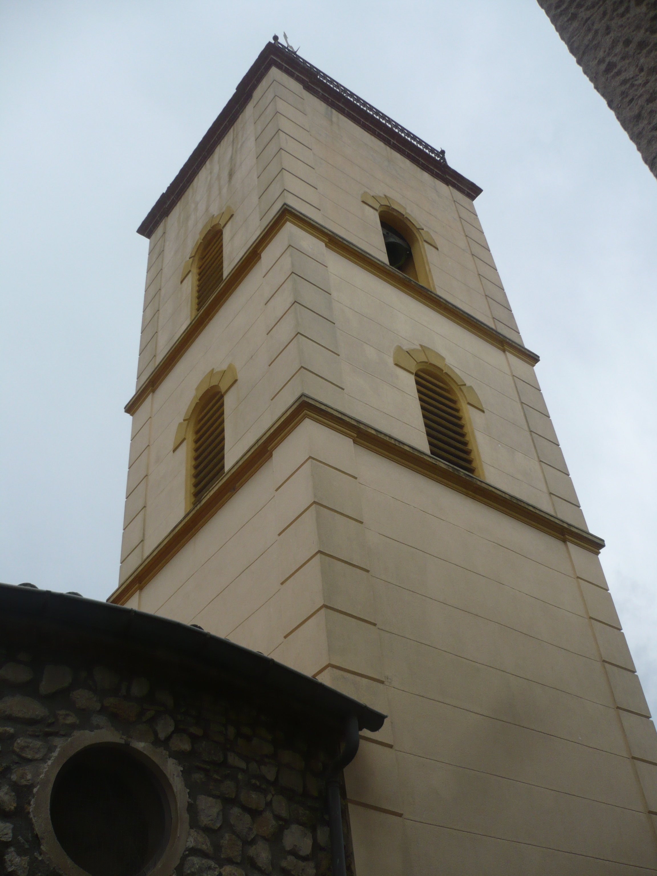 Clocher de l'église Saint-Génis de Tautavel